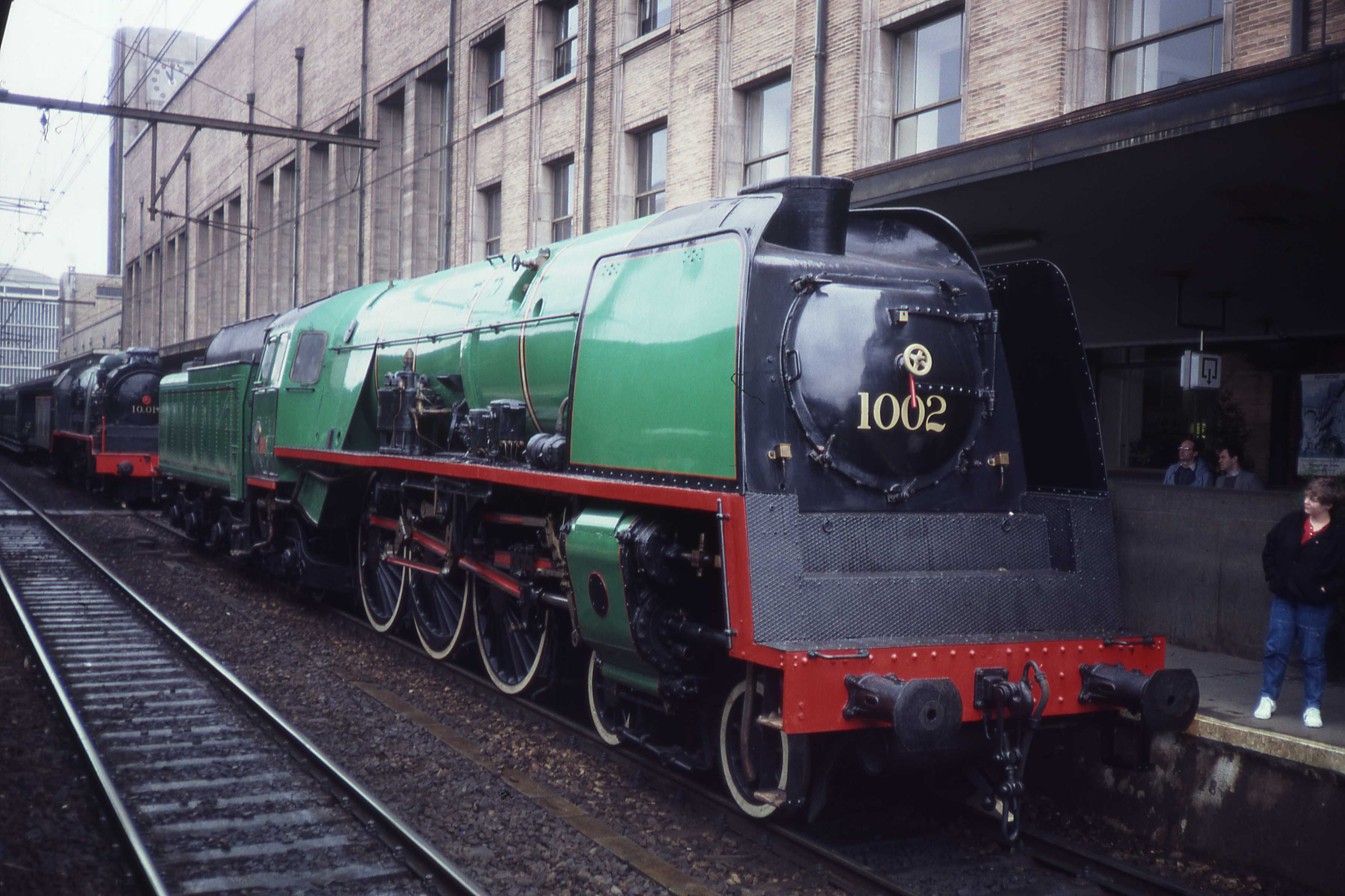 Stoomloc 1002 in station Brussel Noord tijdens de viering van 150 jaar spoorwegen in België